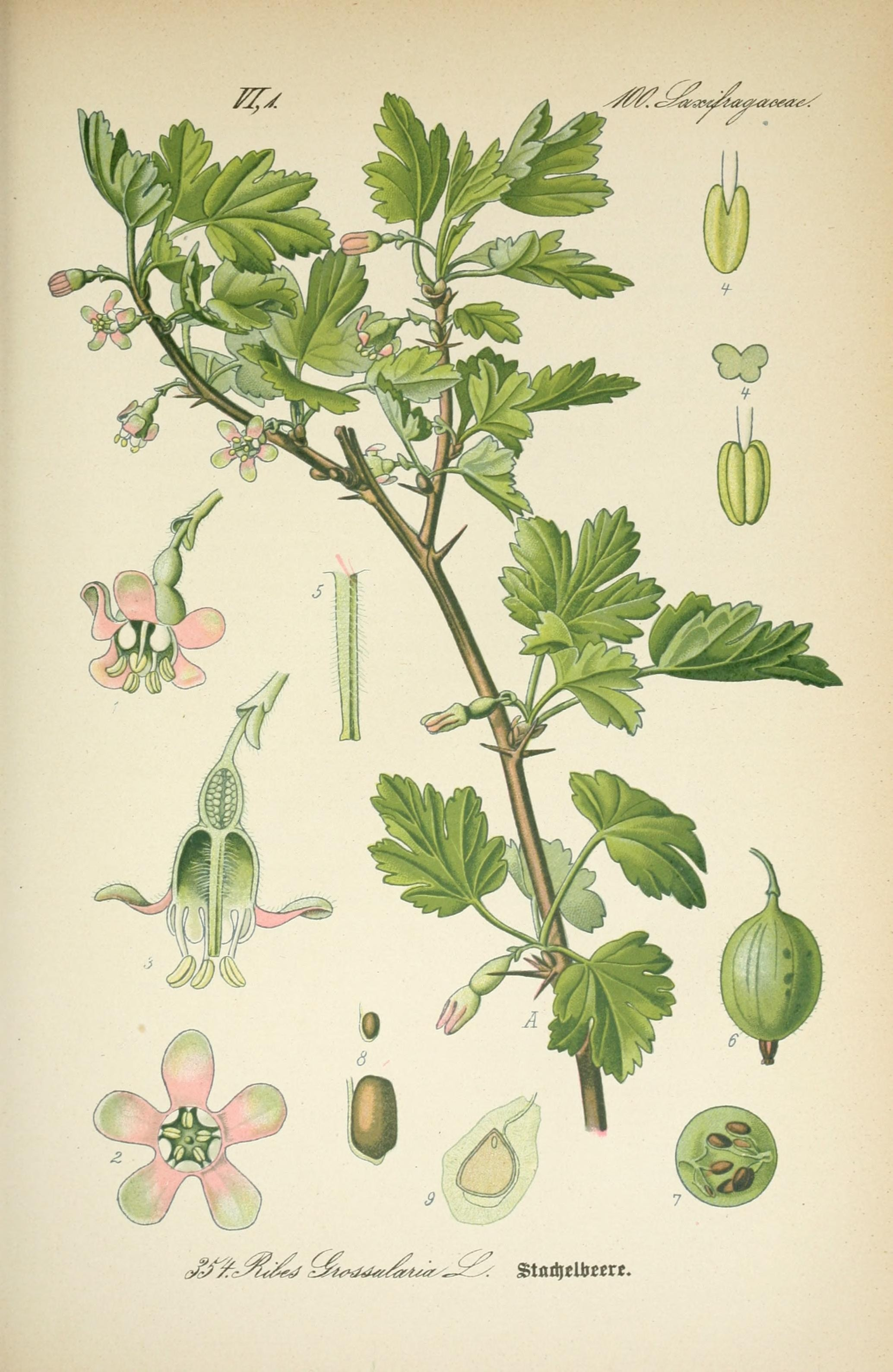 .&& Staüitlbttxt.